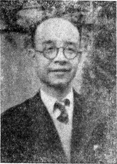 易君左